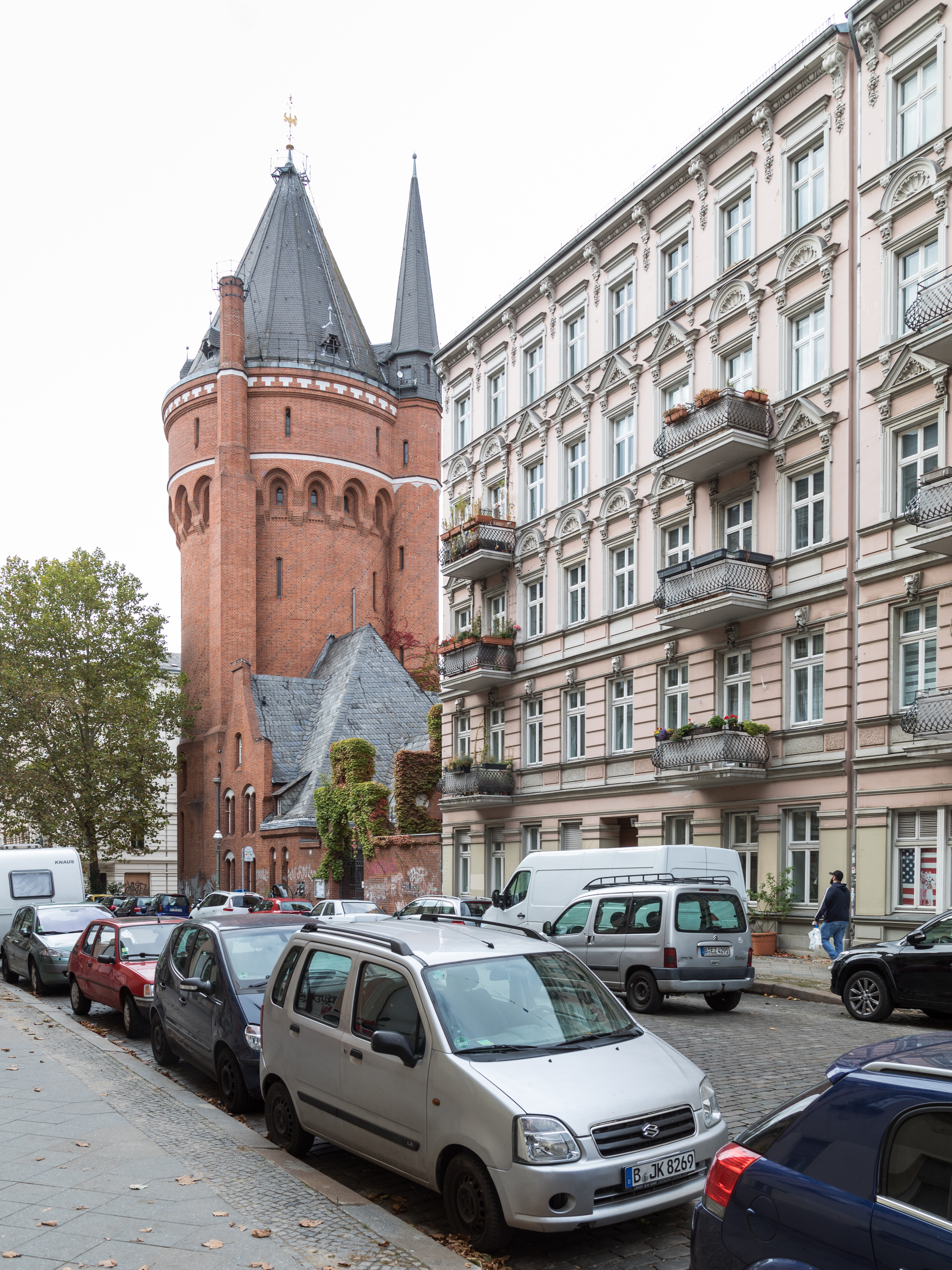 Mietshaus Fidicinstr. 36 (erbaut 1893/94) und Wasserturm Fidicinstr. 37/Kopischstr. 7 (erbaut 1887/88) in Berlin-Kreuzberg.